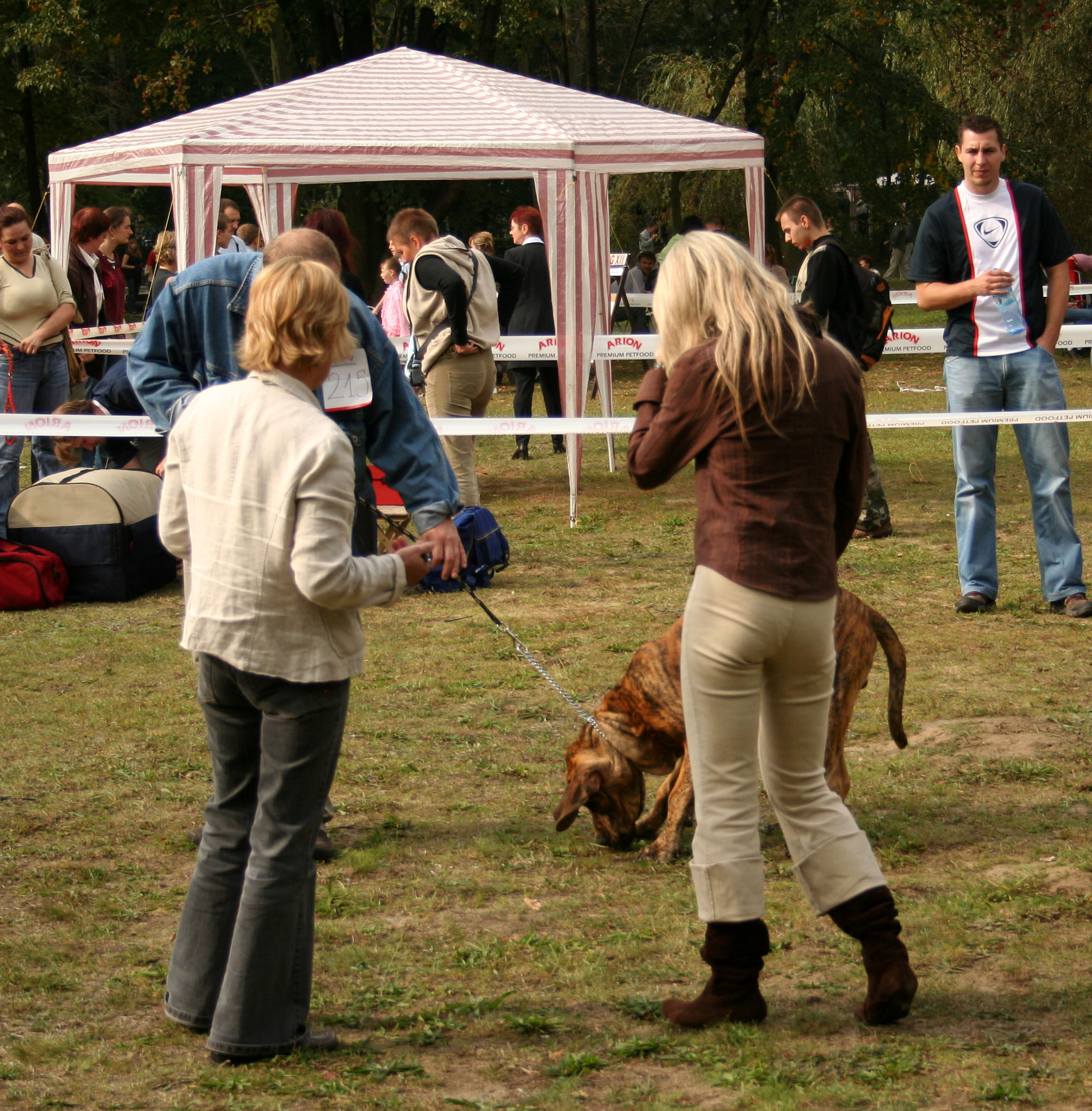 Krajowa_Wystawa_Psów_Rasowych_Rybnik_2006